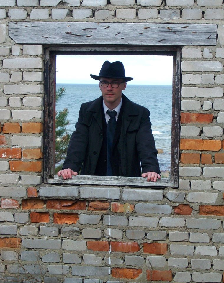 Loksa